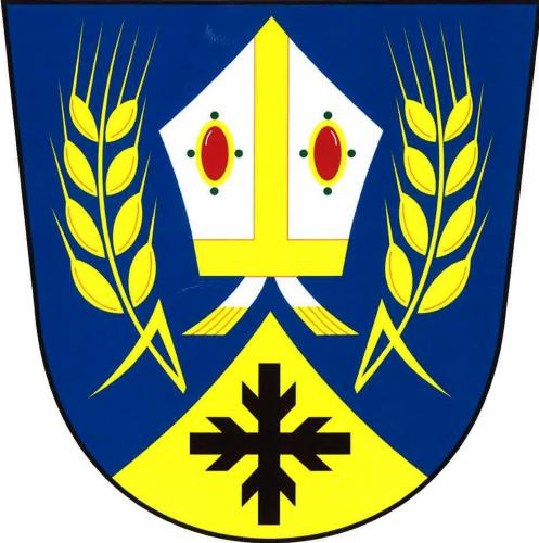 Bubovice znak